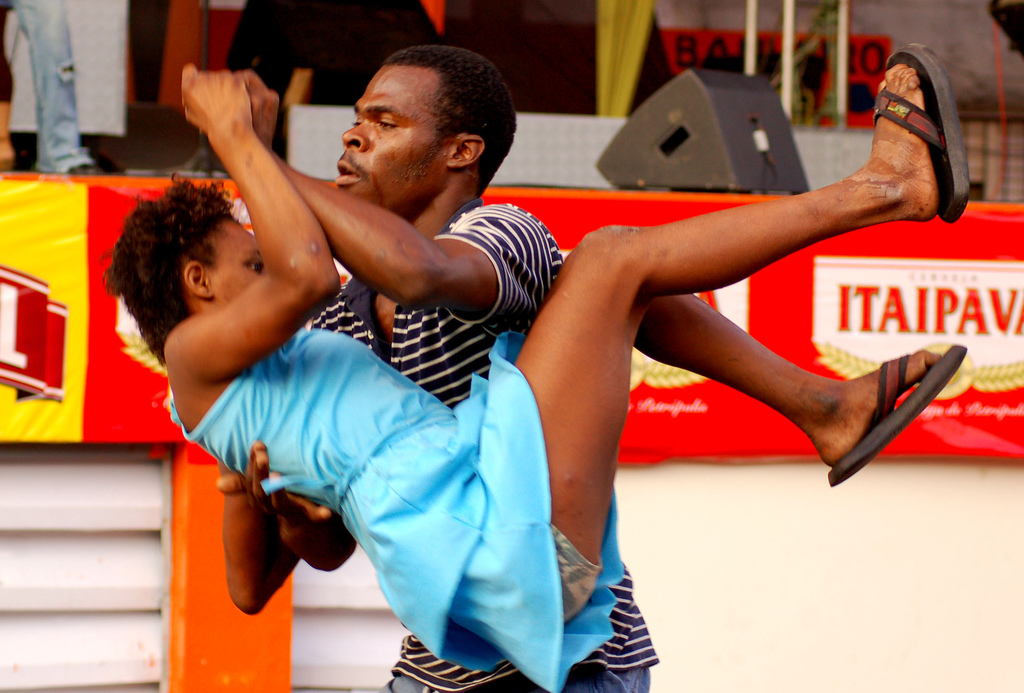 Casal dando um show de forró